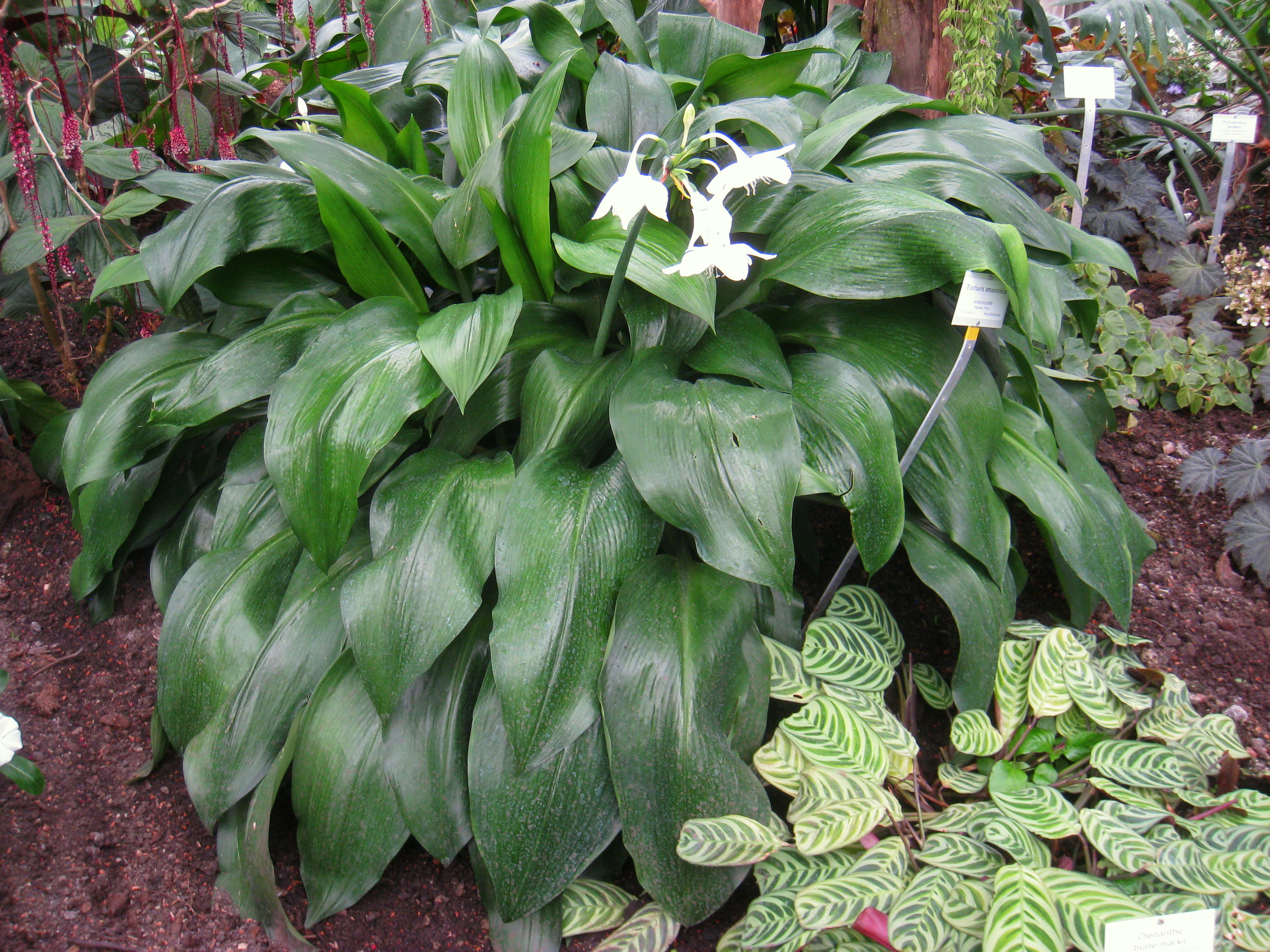 Eucharis amazonica specimen in the Botanischer Garten, Berlin-Dahlem (Berlin Botanical Garden), Berlin, Germany.